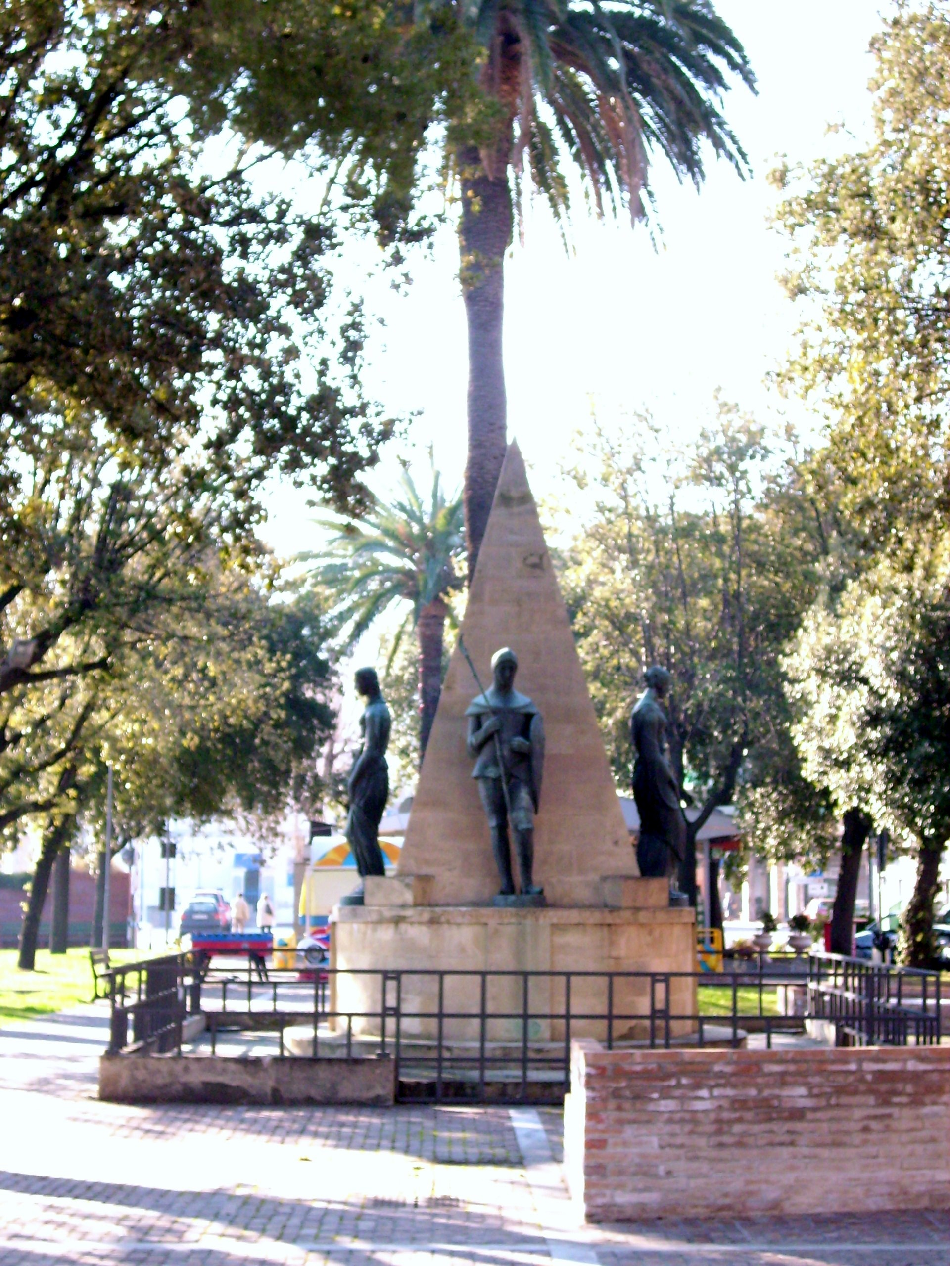 Monumento ai caduti di Vado Ligure, Liguria, Italy